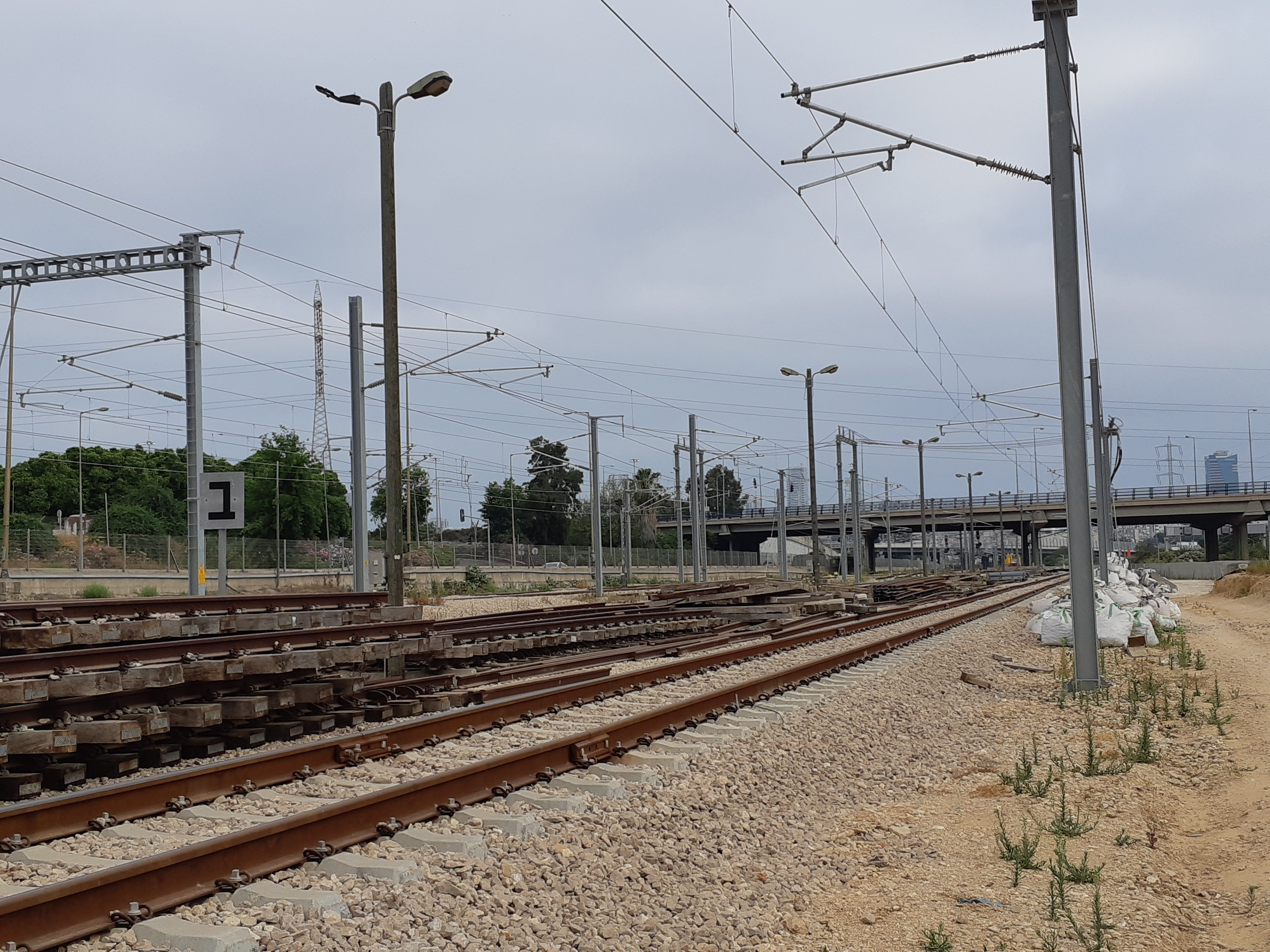 חישמול מסילות הרכבת בתחנה התפעולית ההגנה